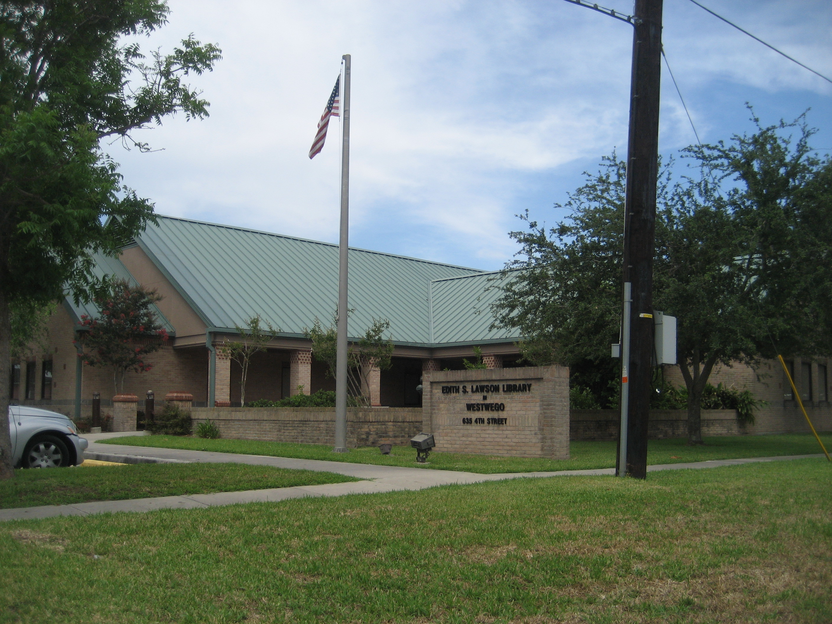 Westwego, Louisiana Library